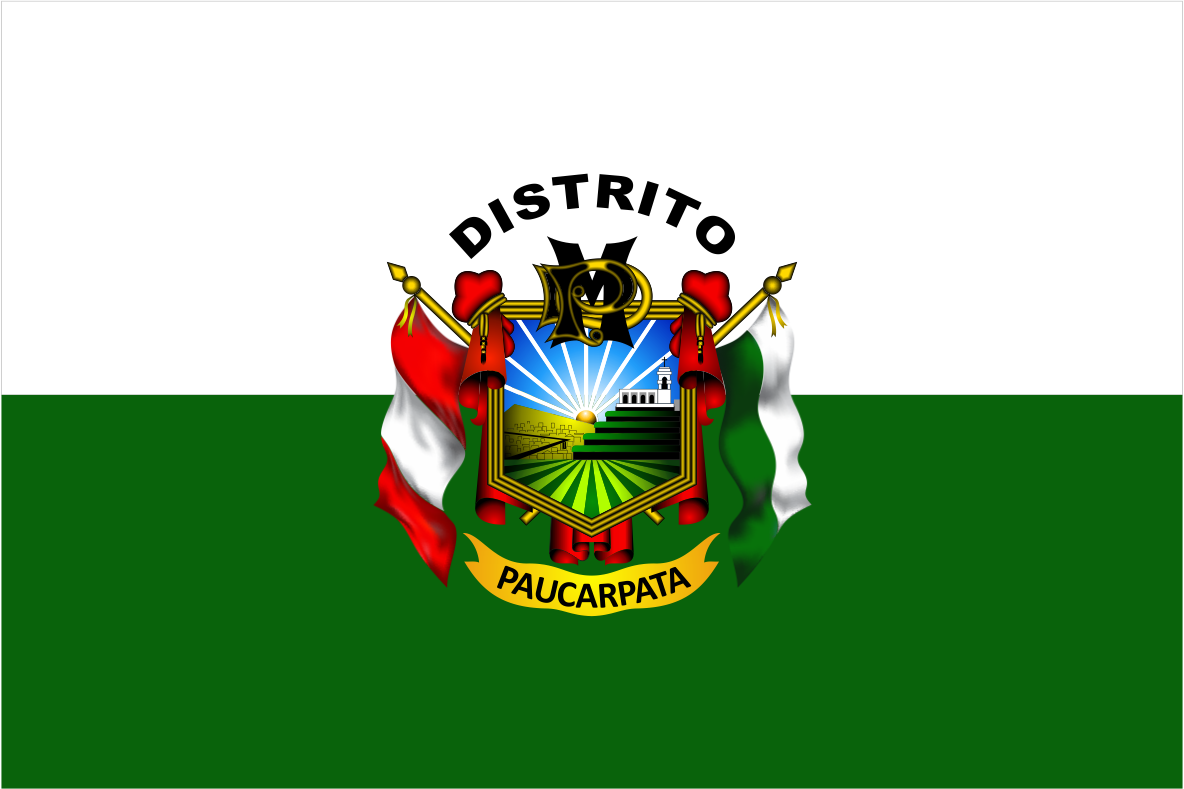 Distrito de Paucarpata